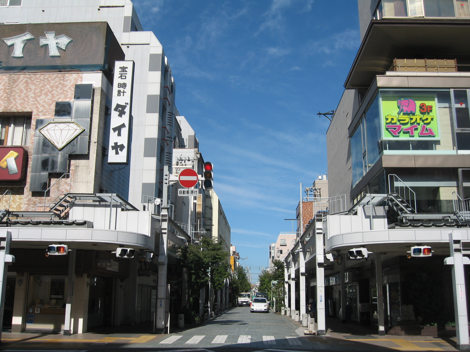 新潟県新潟市中央区。古町通8番町の画像。